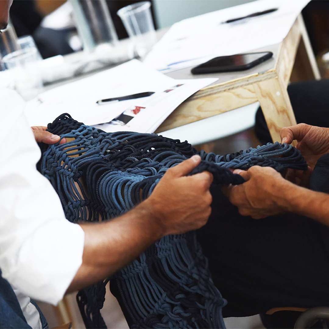 I-SKOOL is een internationaal educatief project van ISKO voor studenten van mode en denim design